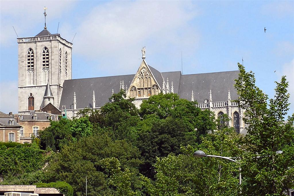 BRUNNER Emmanuel